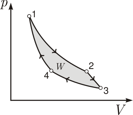 Znázornenie Carnotovho cyklu Licensing